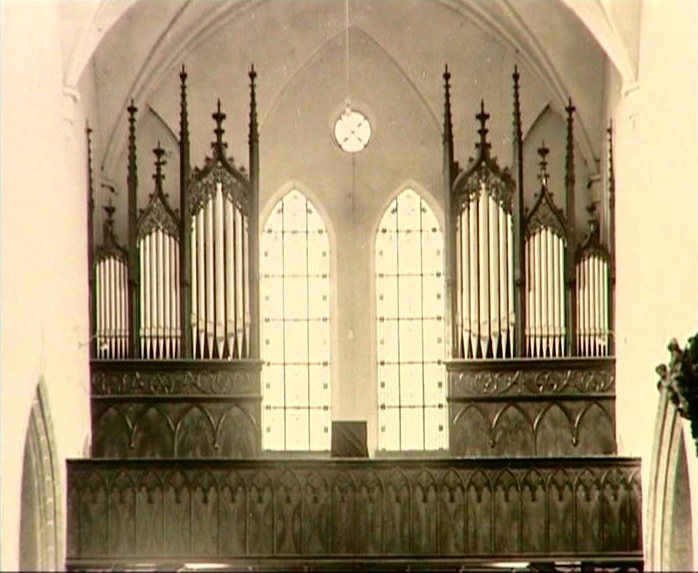 Die Orgel von St. Martin zu Memmingen von 1853.